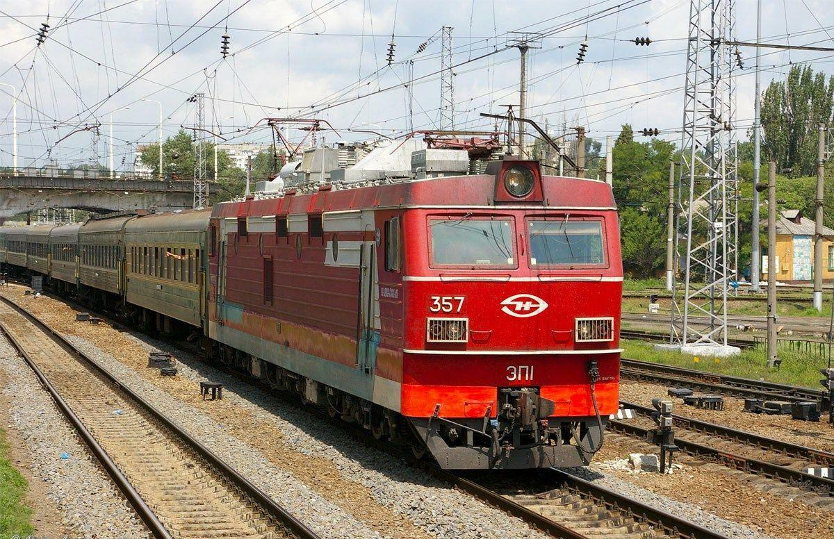 Электровоз ЭП1-357 с поездом, станция Ростов-Главный, Ростов-на-Дону.